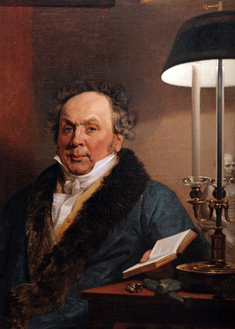 Портрет графа Ф.А. Толстого. Дж. Доу. Ок. 1827. Коллекция Подстаницких.